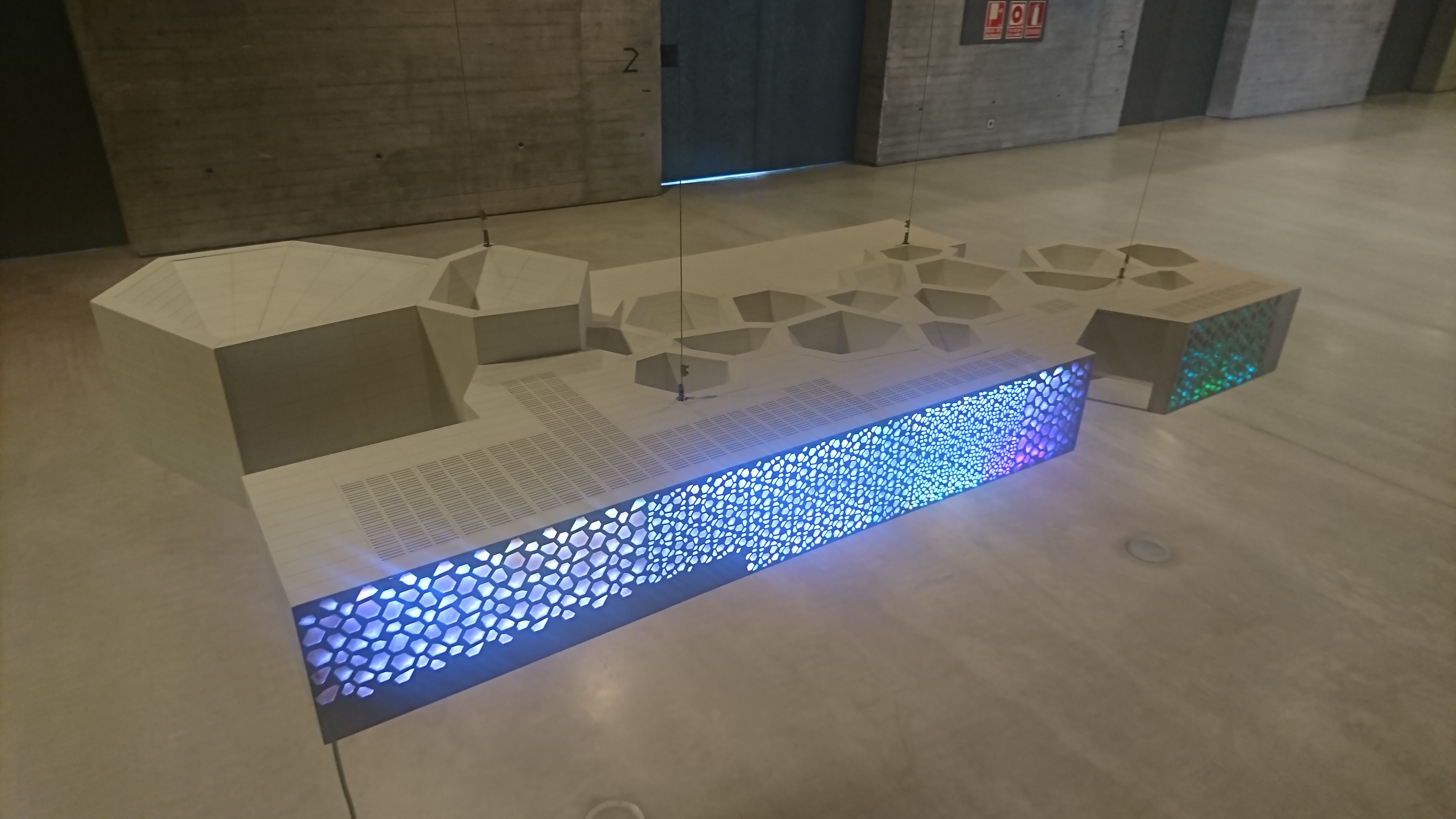 C3A Córdoba